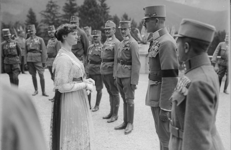 Verleihung des Maria-Theresien-Ordens während des Ersten Weltkrieges (1918) in Villa Wartholz in der niederösterreichischen Ortschaft Reichenau an der Rax. Im Bild spricht Kaiserin Zita mit Wilhelm v. Cavallar. Im Hintergrund ist Anton v. Léhar zu sehen. Im Vorgrund ist Oberleutnant Karl Ungár zu sehen.